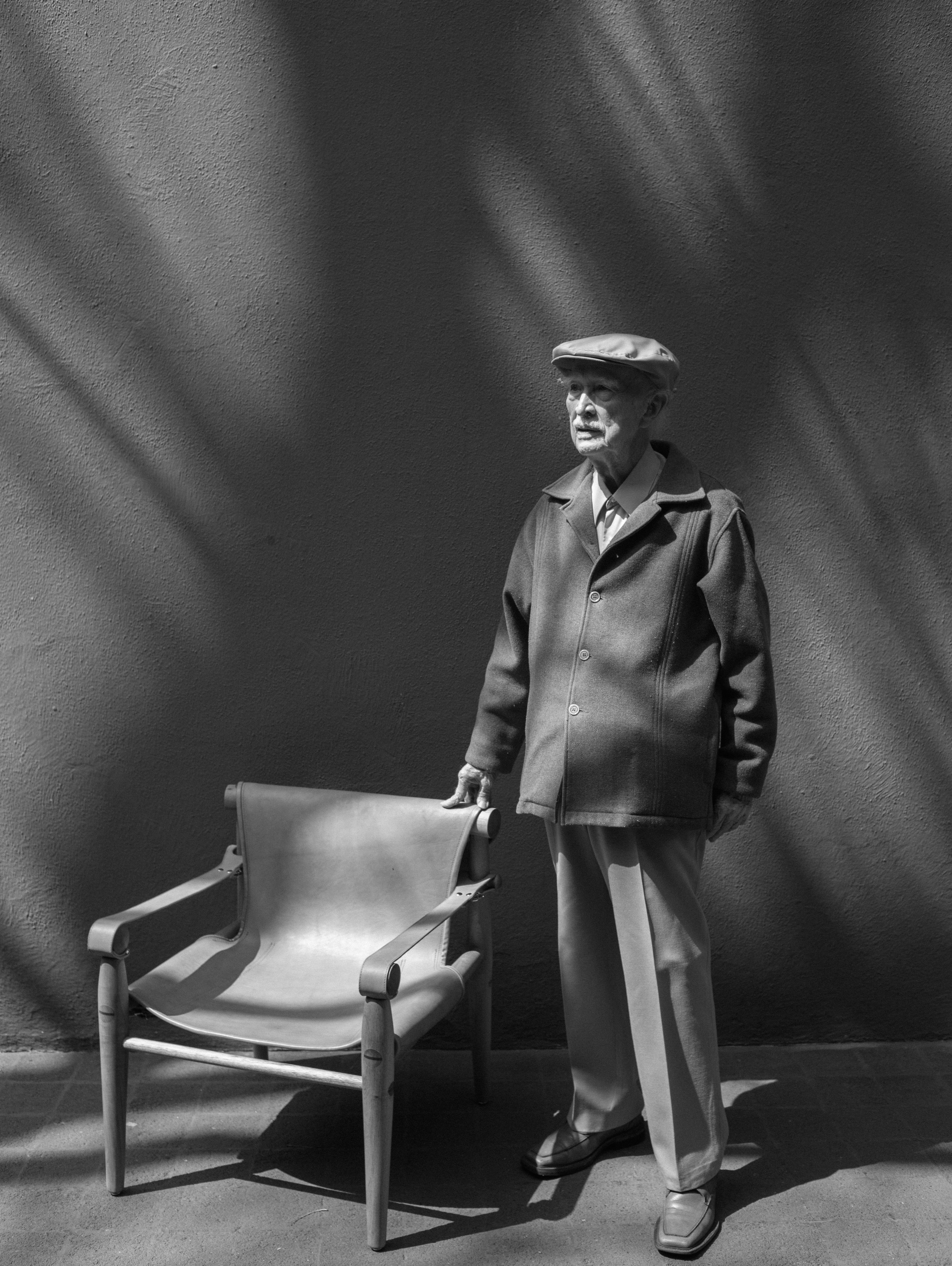 Retrato con Silla Cofran. Foto Kovi Konowiecki